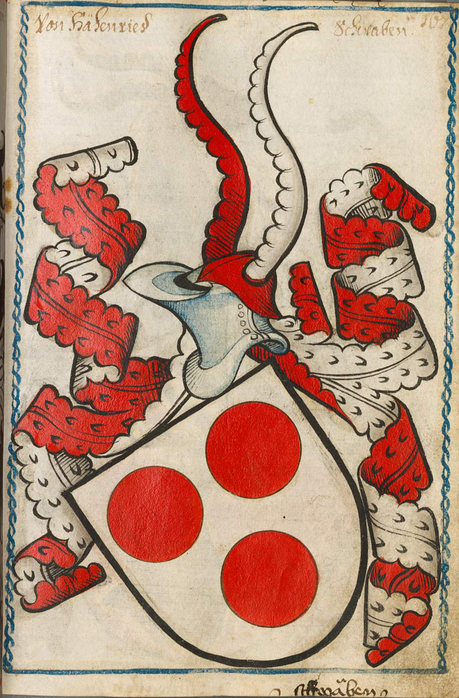 Scheibler'sches Wappenbuch, älterer Teil; Seite 167 Von Hähenried Schwaben